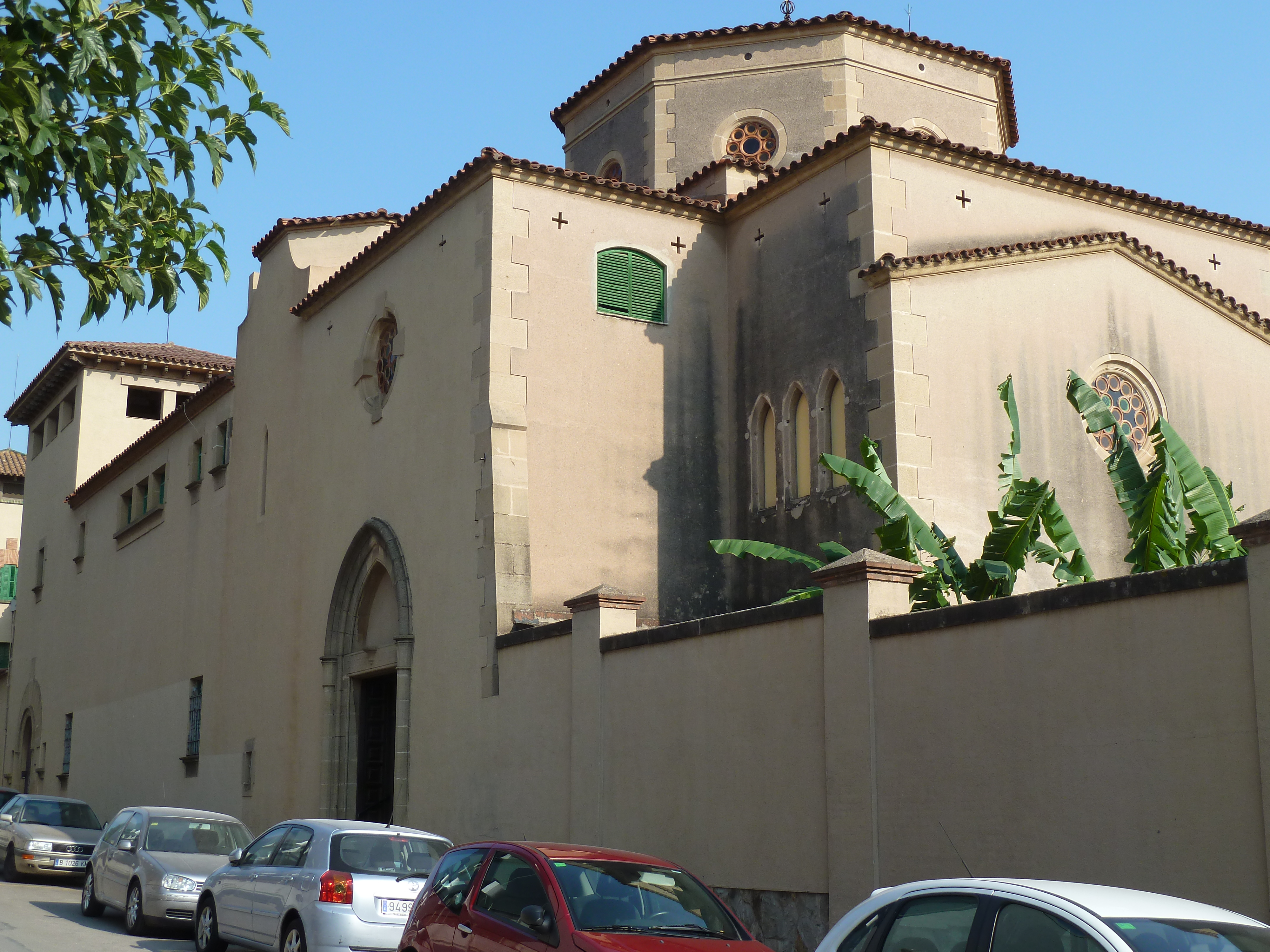 Esplugues de Llobregat